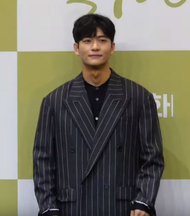 30일 오후 서울시 구로구 신도림 라마다서울신도림호텔에서 KBS '조선로코 녹두전' 제작발표회가 열려 배우 장동윤X김소현X정준호X강태오가 참석해 포토타임을 갖고 있다.